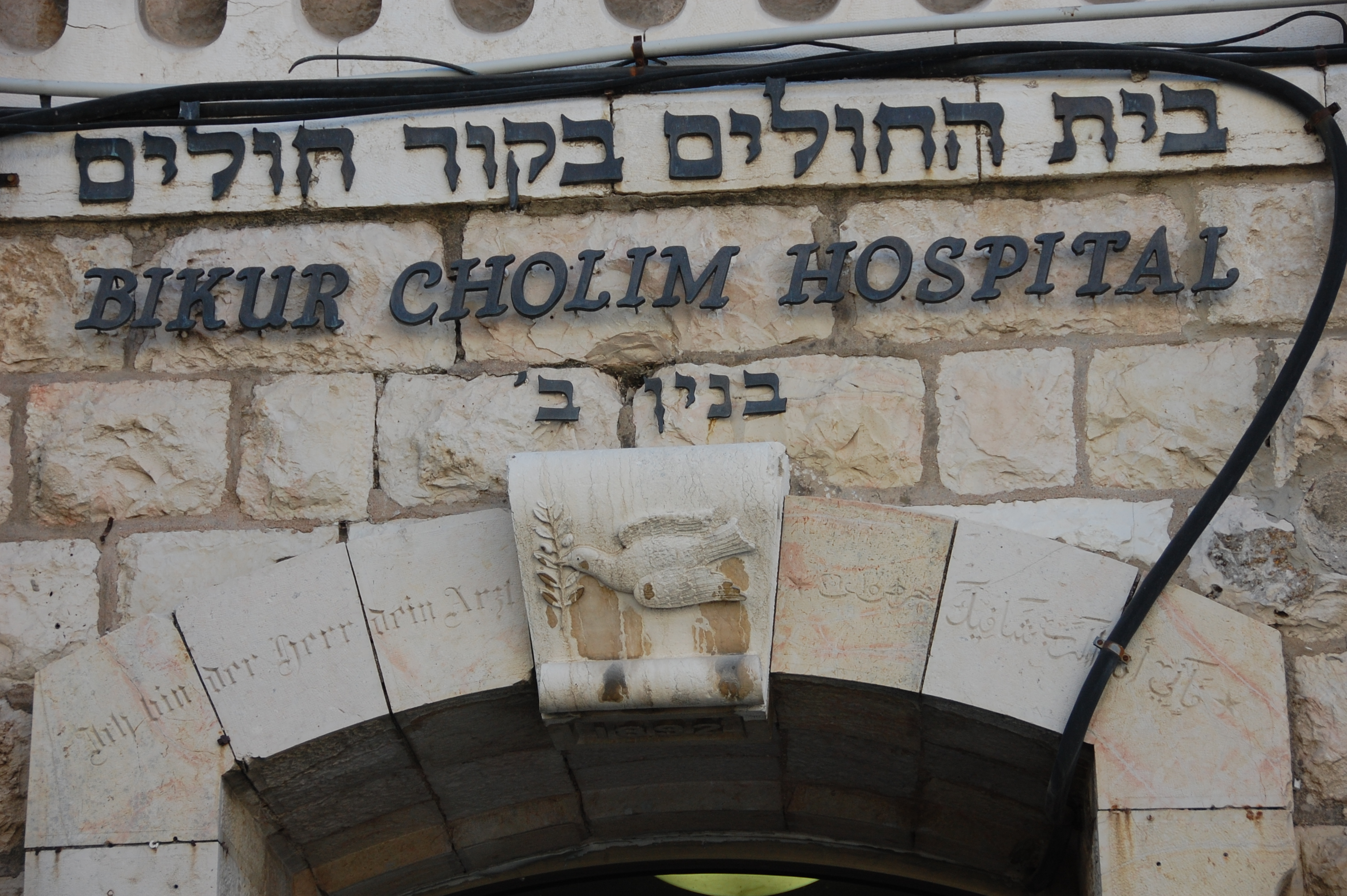 Bikur Cholim Hospital, jerusalem